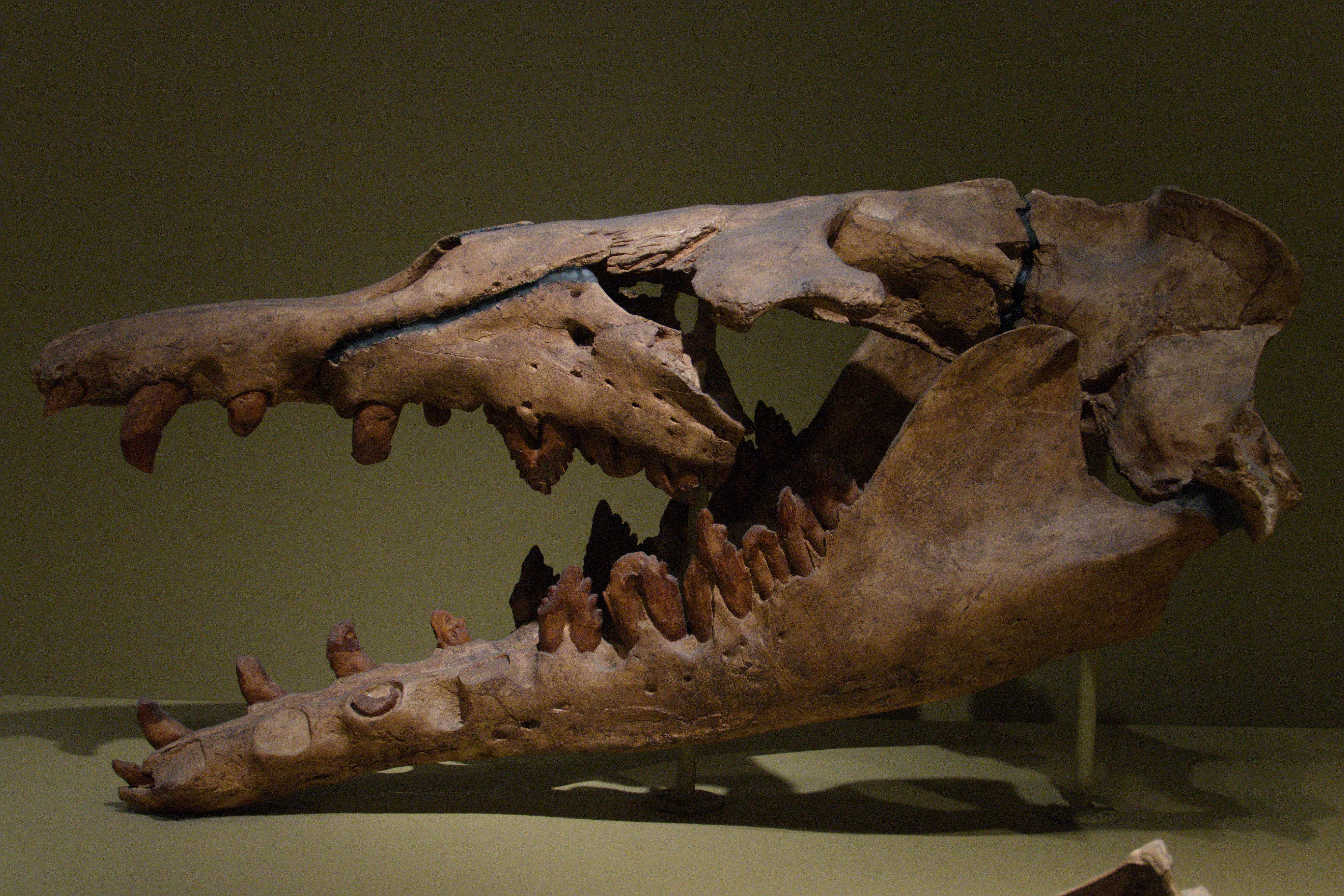 Schädel eines Basilosaurus, Field Museum of Natural History in Chicago.